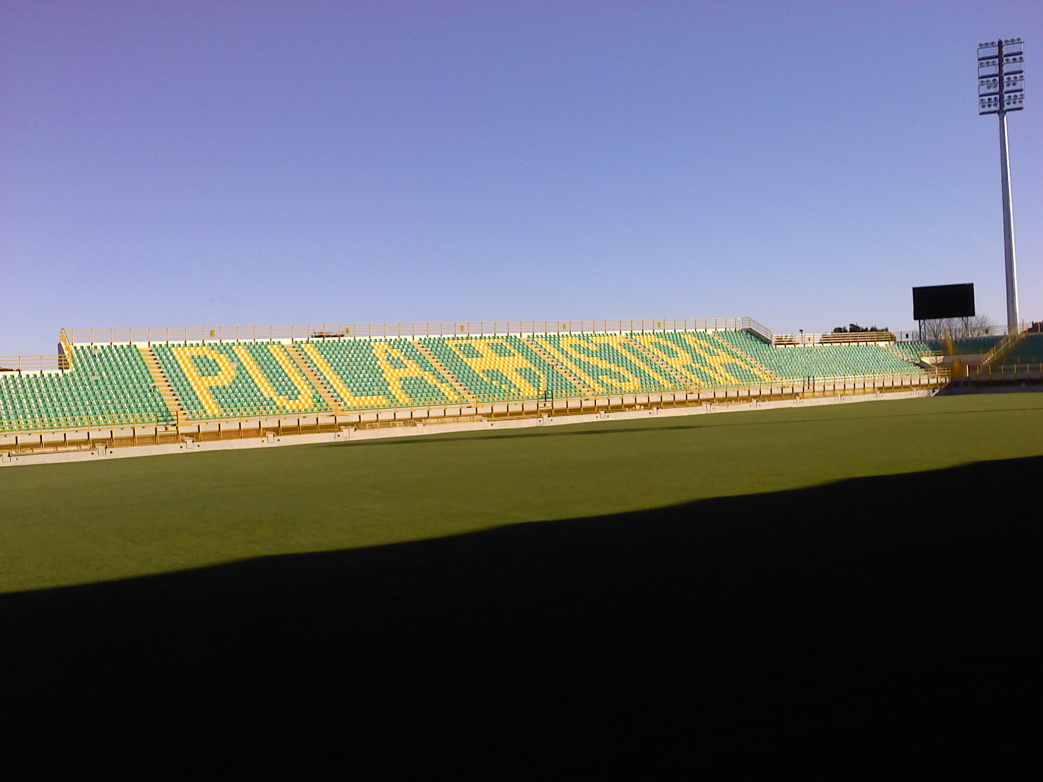 pula - stadion - 2010 - january 2011 (E)